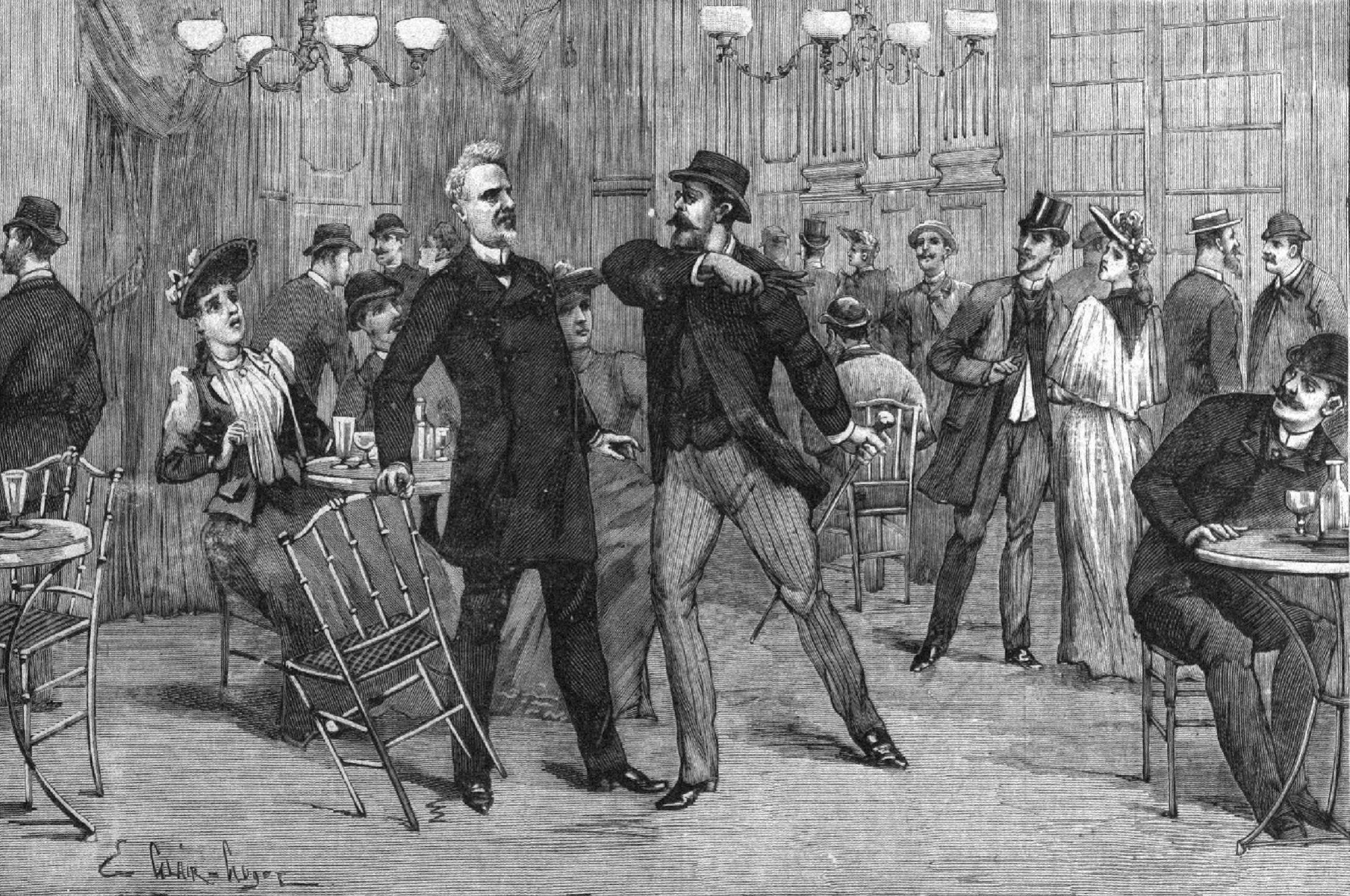 "L'incident Canivet-Rochefort au casino d'Ostende".